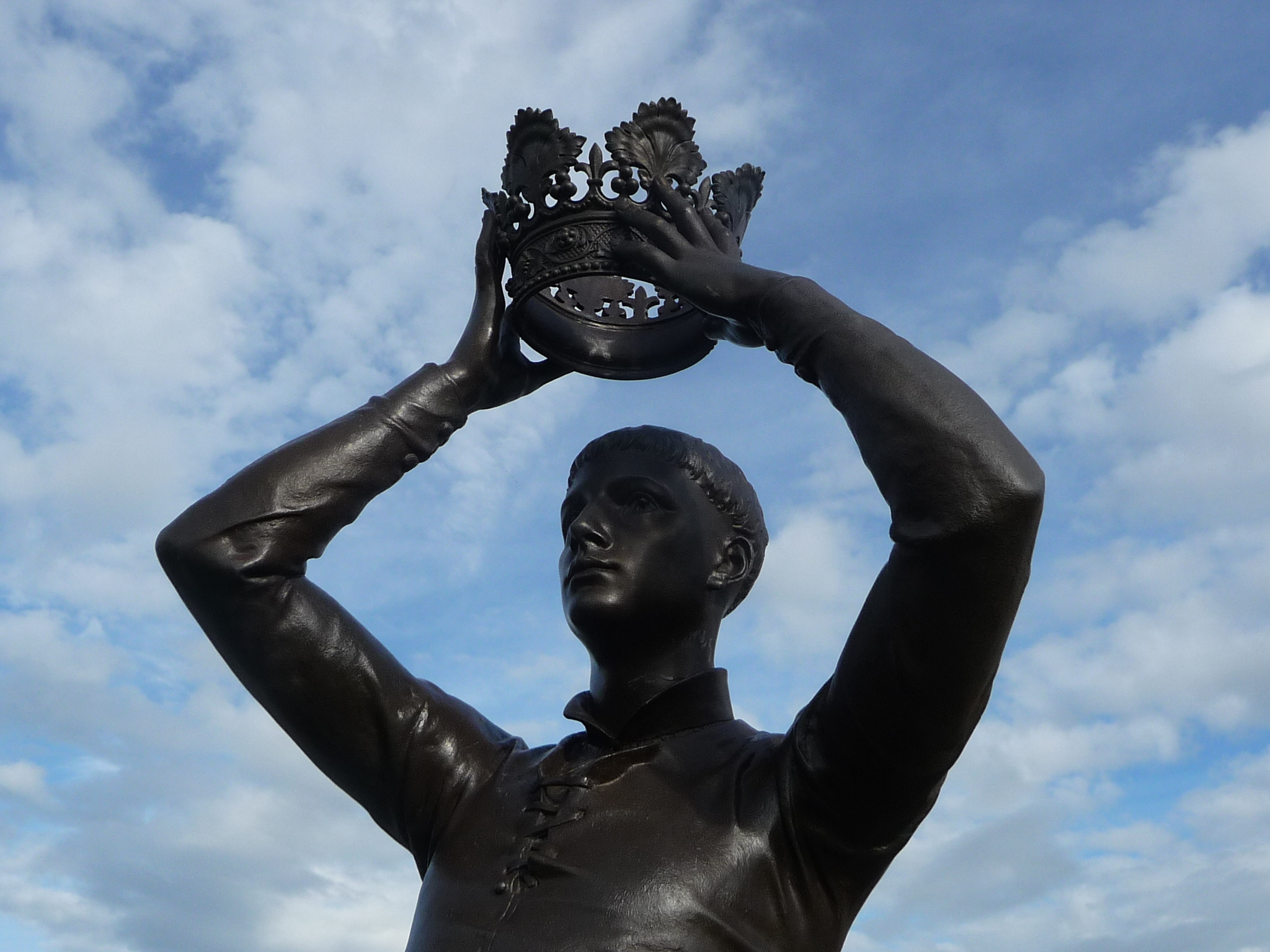 Gower Memorial in Stratford